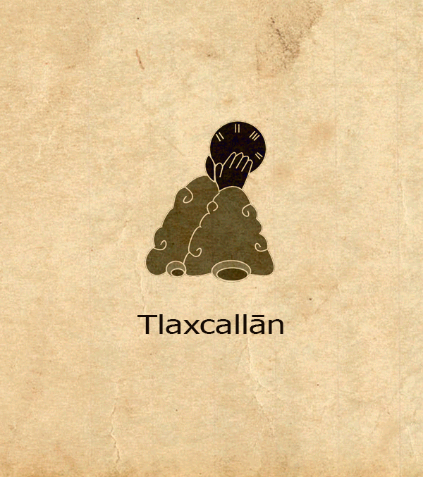 Glifo de Tlaxcala